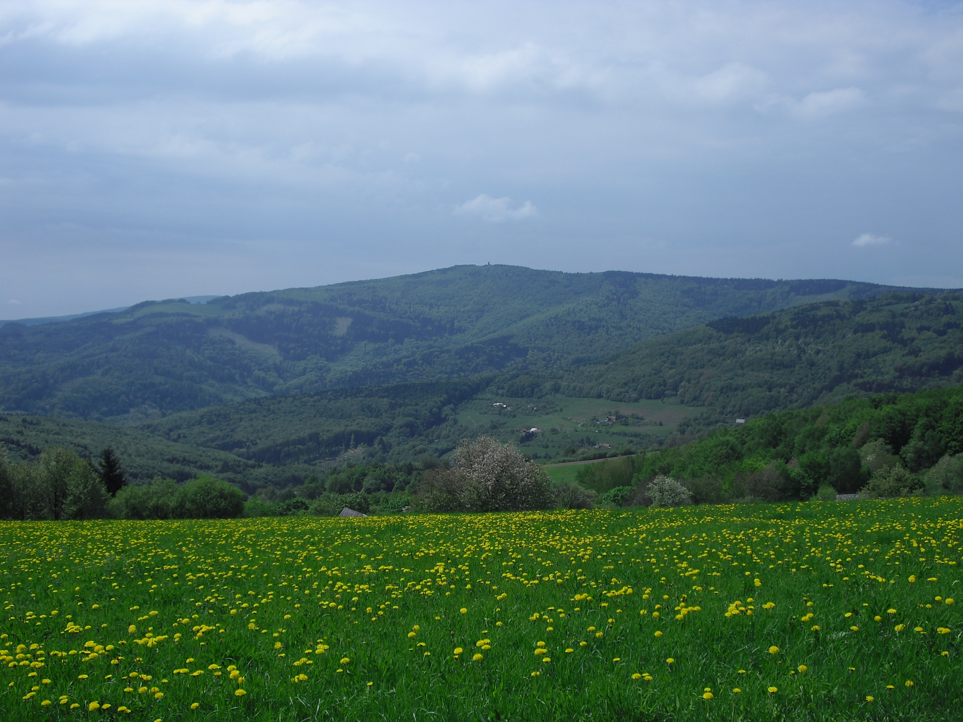 Velký Lopeník, pohled z Vyškovce